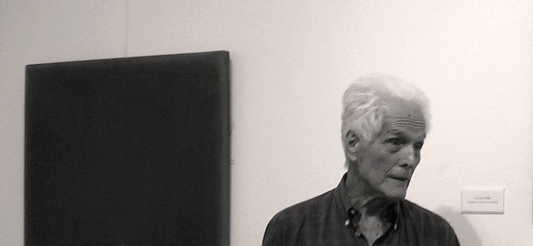 L'artista Guido Strazza alla sua personale del 2007 alla Stazione dell'arte di Ulassai